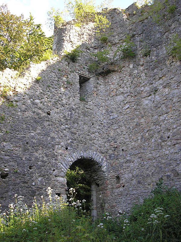 Burg Rumburg über Enkering (Landkreis Eichstätt, Oberbayern) / Rumburg Castle, Upper Bavaria, Germany. Das Haupttor vom Burghof / The gate from the courtyard. Eigene Aufnahme, Juni 2006 / Own photo, June 2006